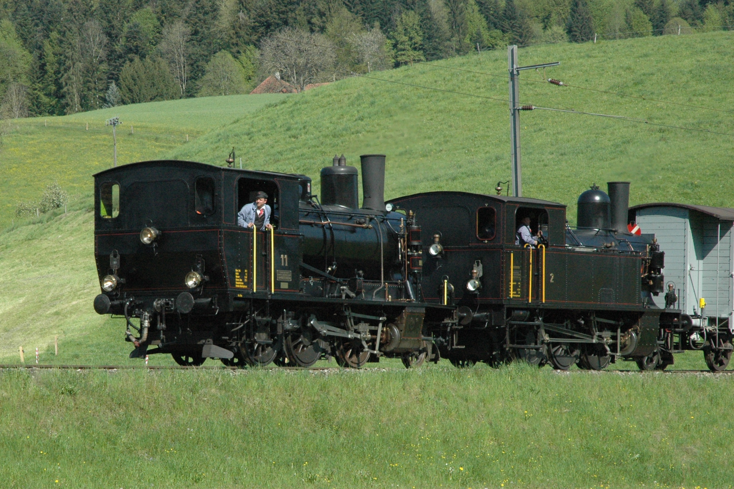 Dampflokomotiven Ed 3/4 Nr. 11 (ex LHB) und Nr. 2 (ex SMB) des Vereins Historische Eisenbahn Emmental (VHE) oberhalb Gammenthal auf der Strecke der Emmentalbahn GmbH (Doppeltraktion, rückwärts, talabwärts)